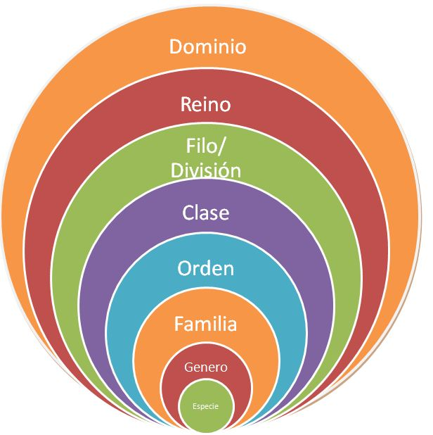 Categorias Taxonomicas